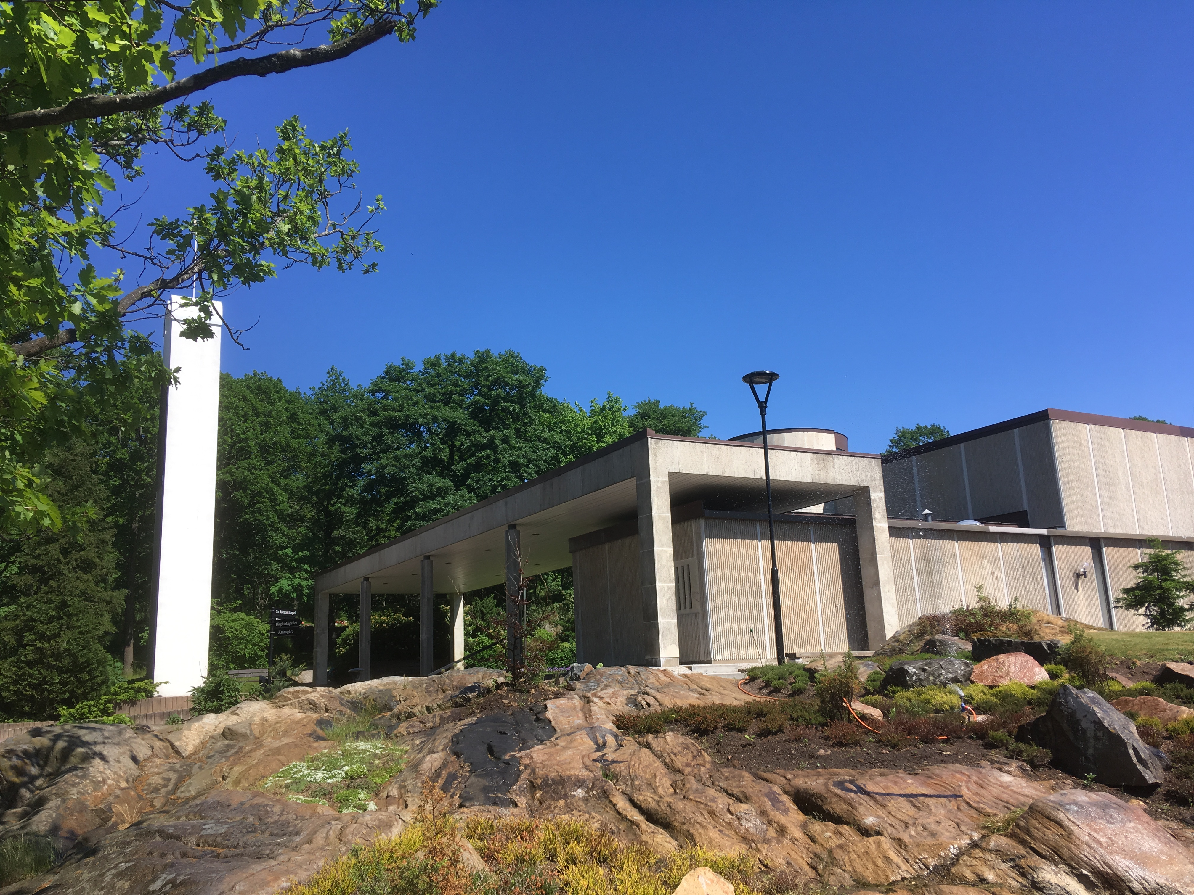 S:t Jörgens kapell, Varberg